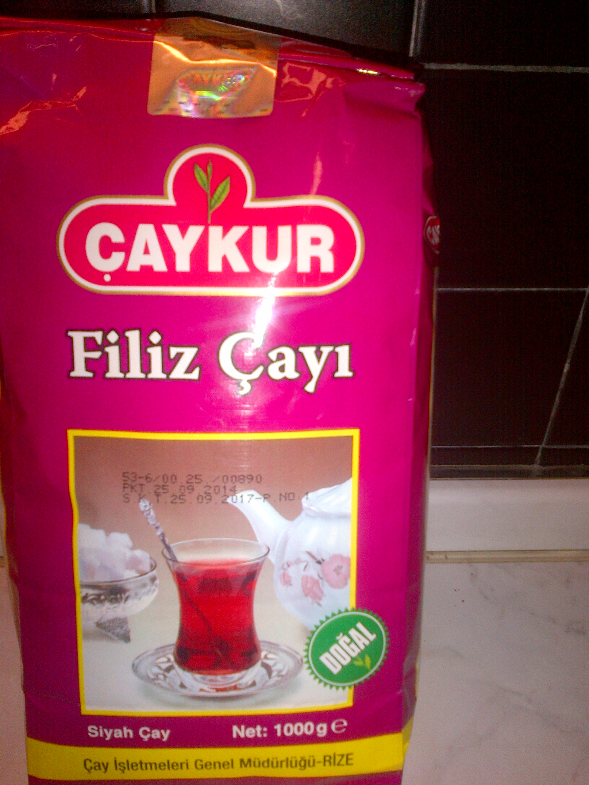 Te turc